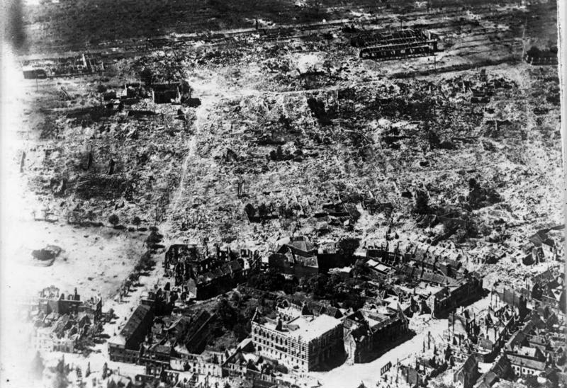 Frankreich, Luftaufnahme von Lens Das von den Engländern zerschossene Lens. Frankreich (1914/18) 10675-17 Information added by Wikimedia users.